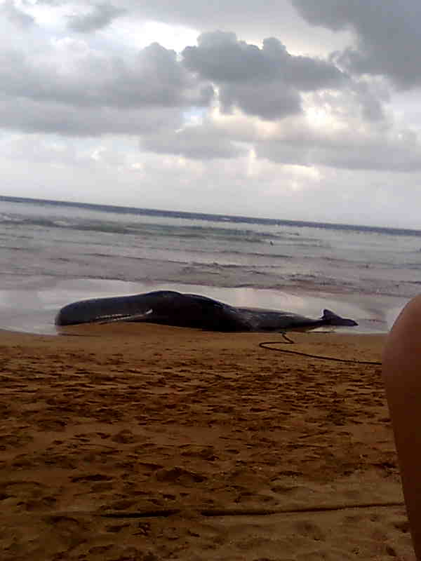 Ballena varada en la playa de Zarautz